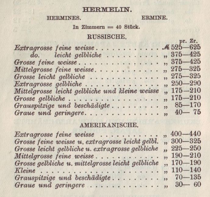 Preis-Verzeichnis Heinrich Lomer, Rauchwaren, Leipzig, Brühl 42. Gegründet 1835. Winter 1913/1914. 32 Seiten 11,5 x 17,5 cm